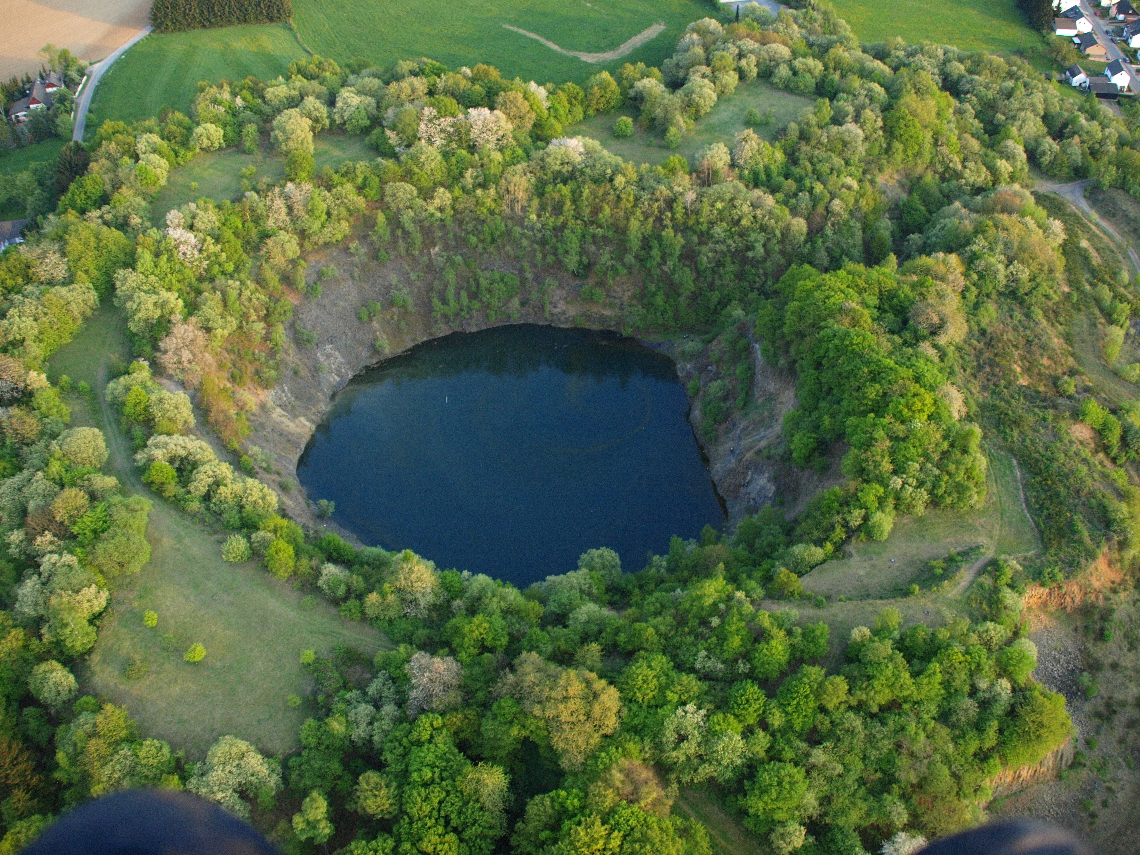 Der ehemalige Steinbruch Eulenberg